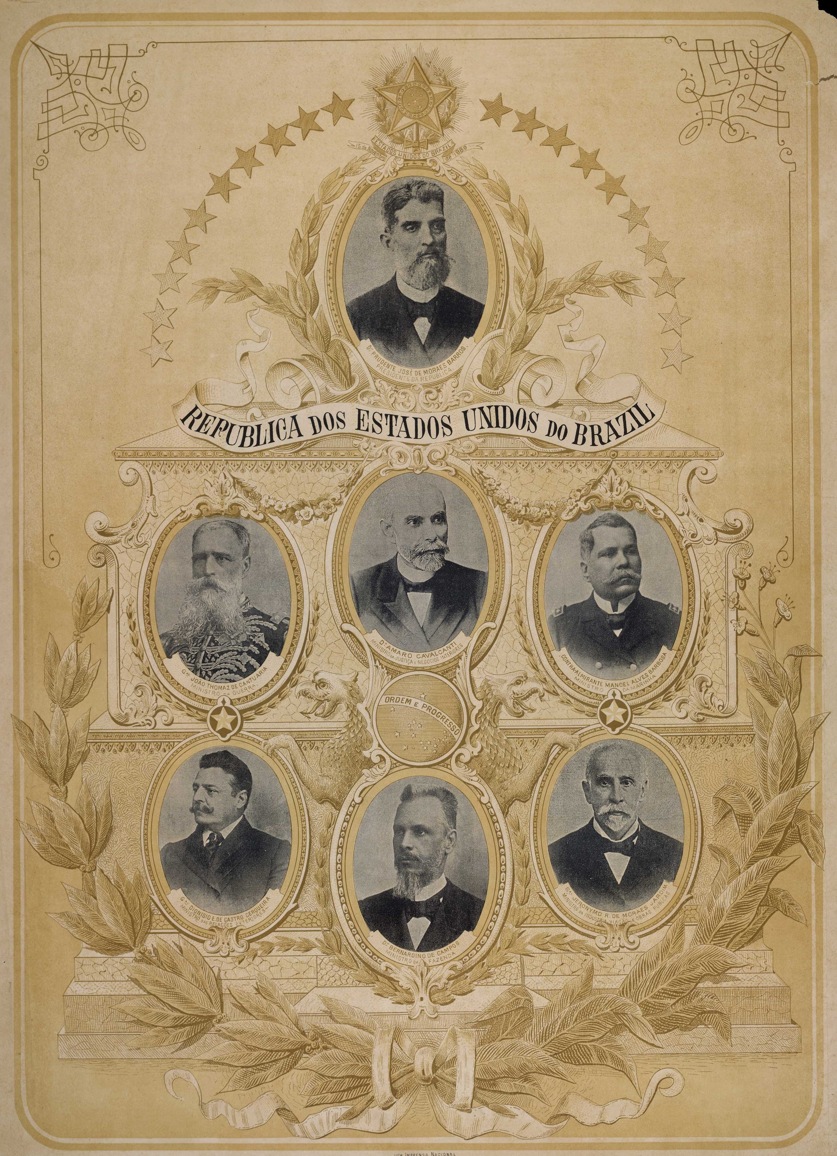 Ministério de Prudente de Moraes como presidente do Brasil